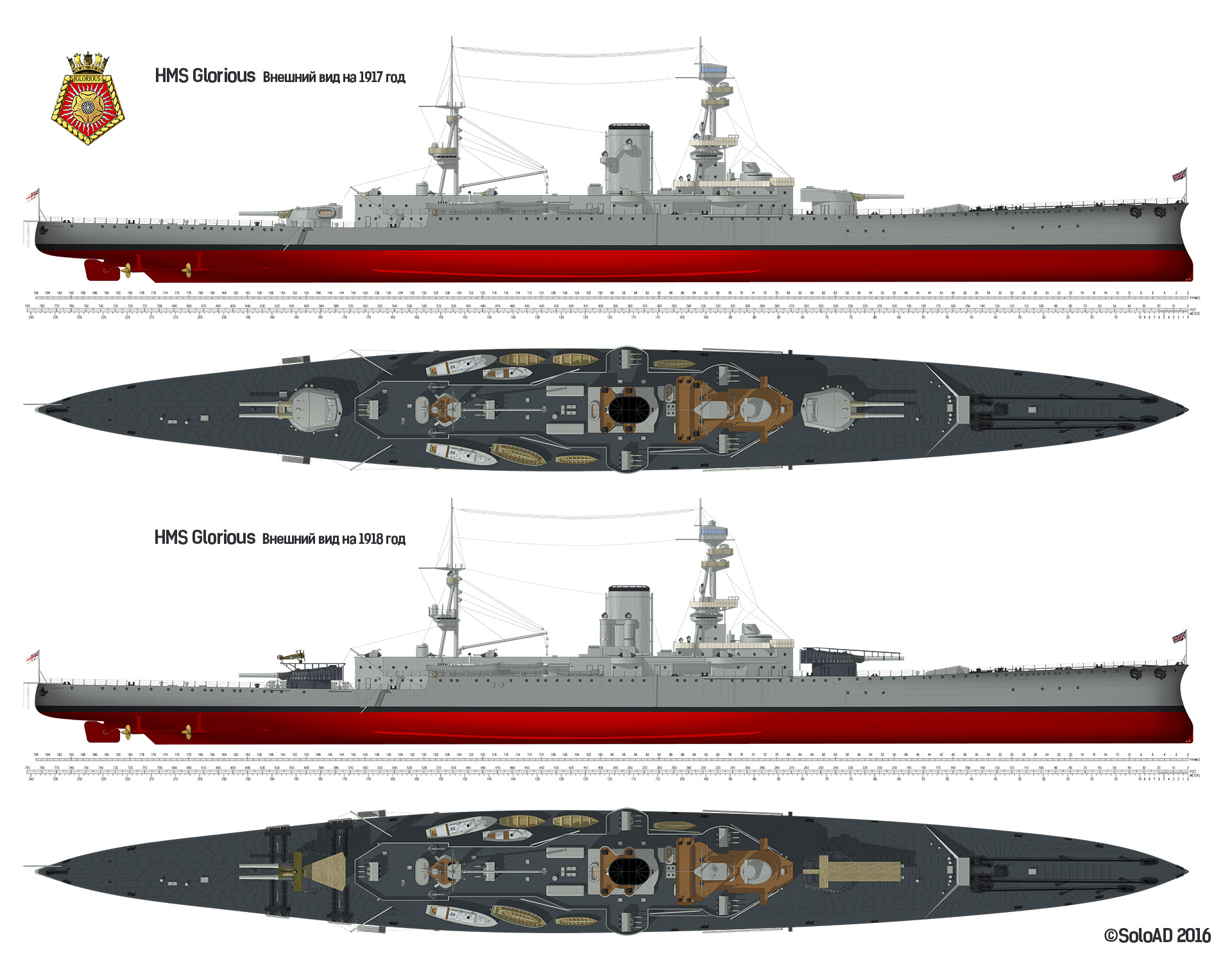 Внешний вид HMS Glorious в первые годы службы